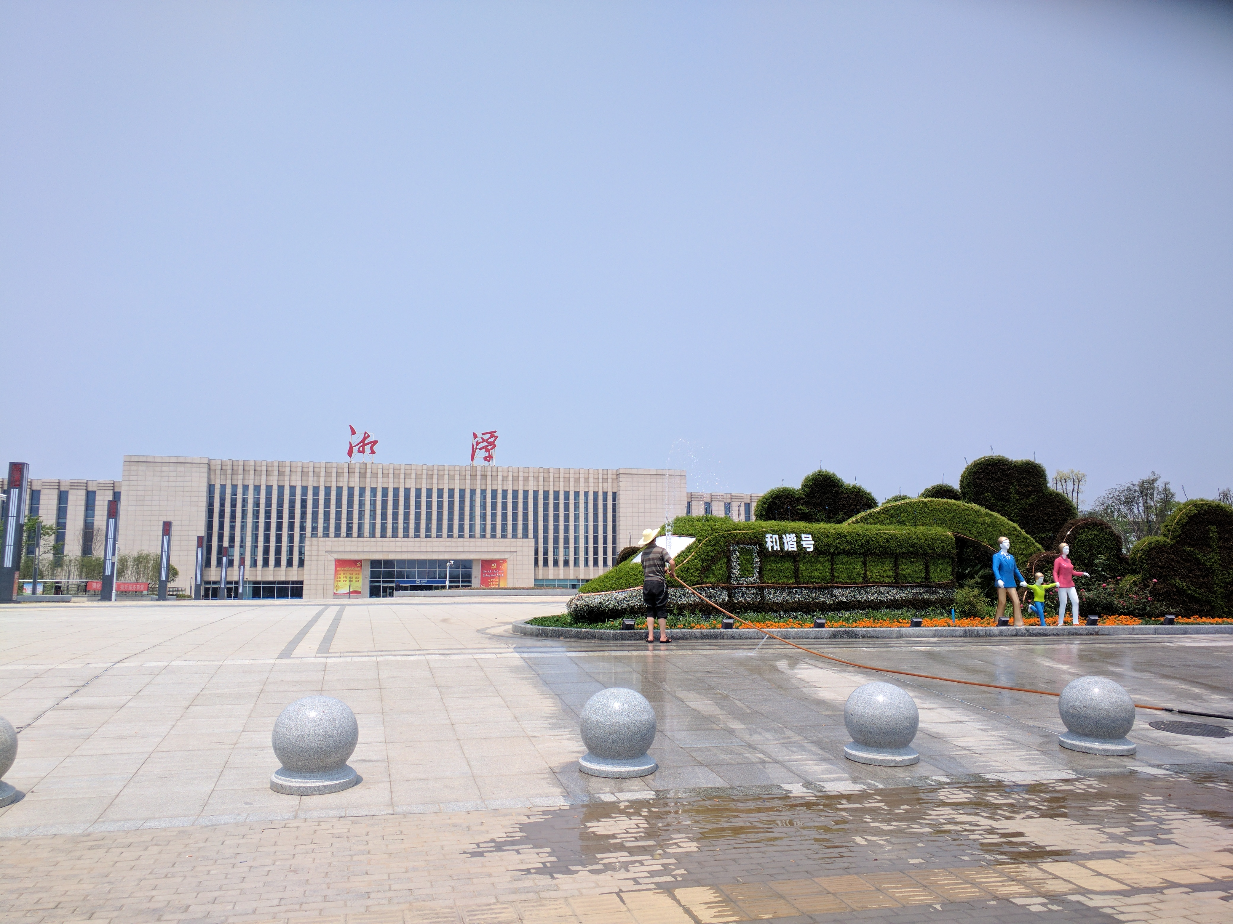 中文（中国大陆）: 湘潭火车站，摄于2017年